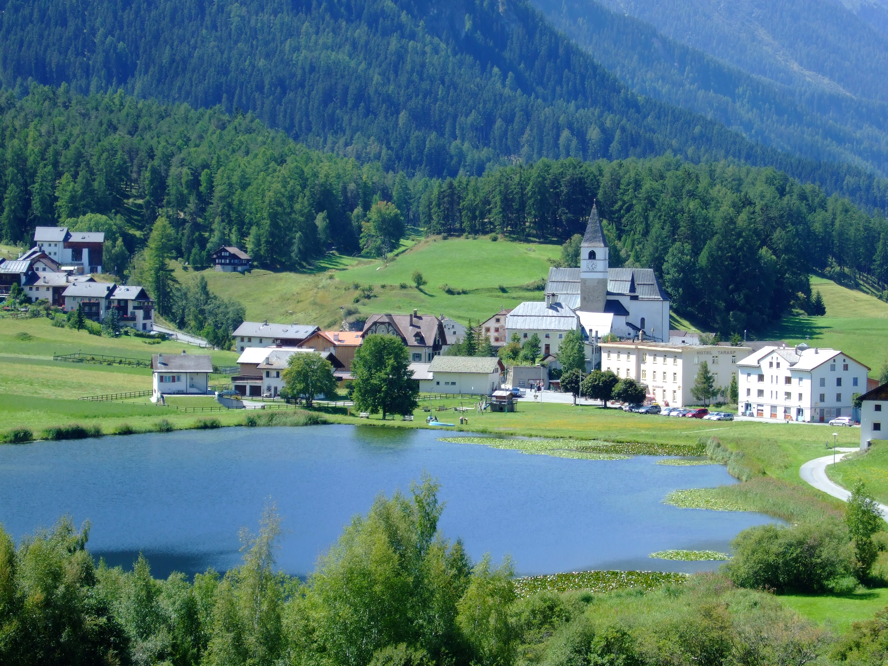 Tarasp Fontana, Unterengadin, Schweiz